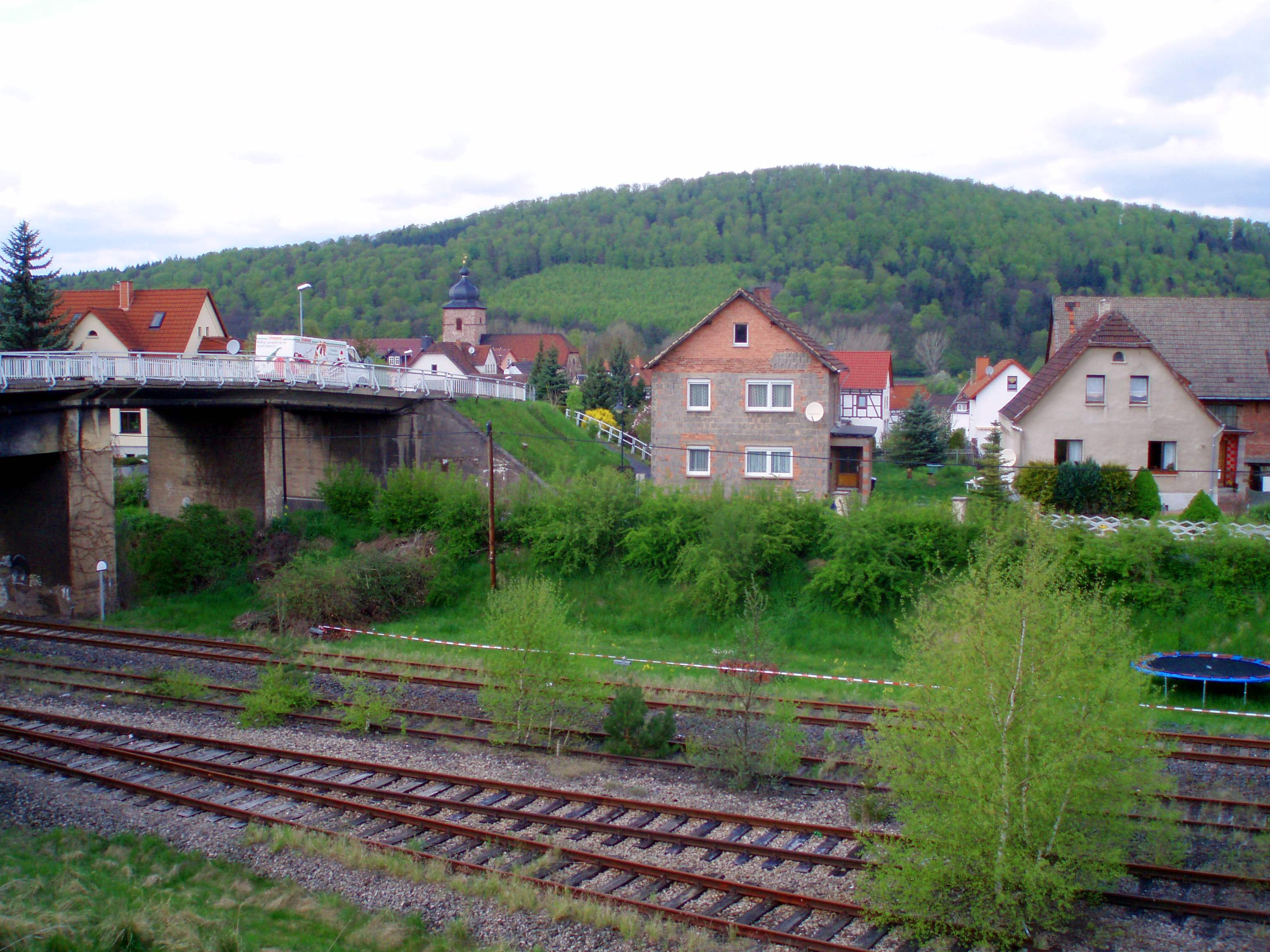 Eisenbahnbrücke und Kirche in Dorndorf